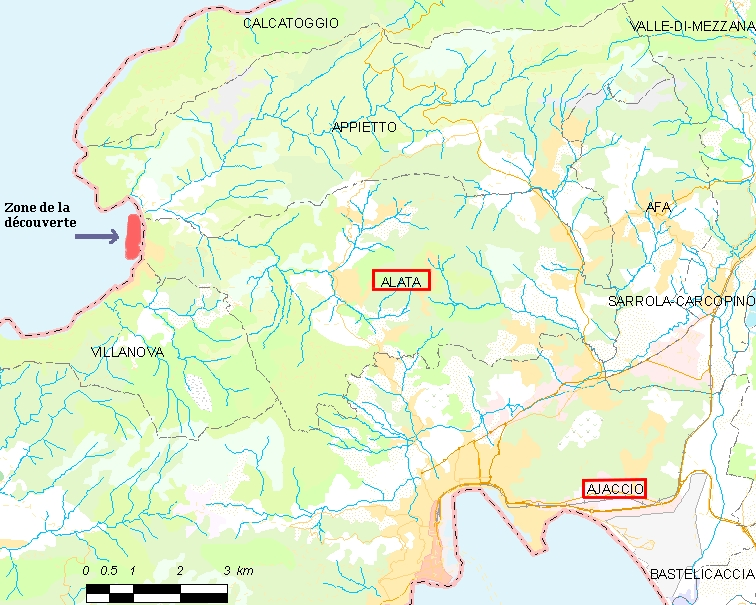 Carte de la région ouest d'Ajaccio, Corse du Sud. Localisation du Golfe de Lava.